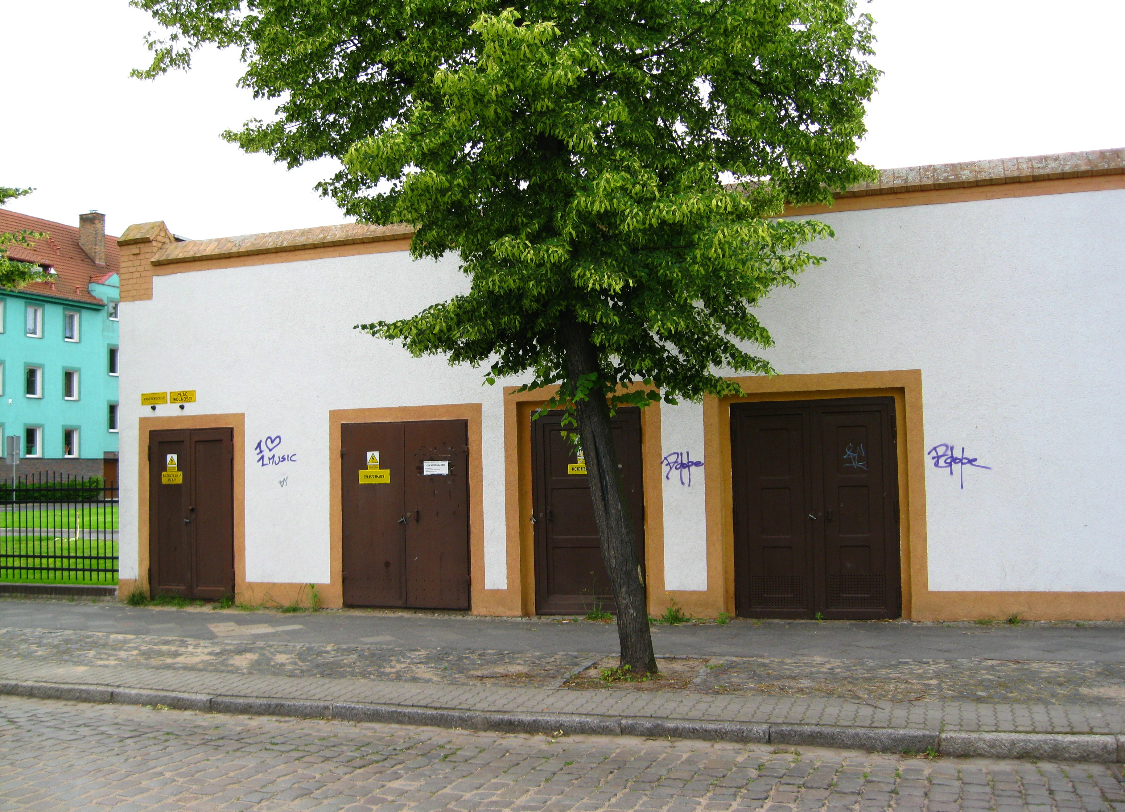 Stacja elektroenergetyczna przy ul. Konstytucji 3 Maja w Słubicach (dawniej na potrzeby wojska, teraz na potrzeby mieszkańców miasta).